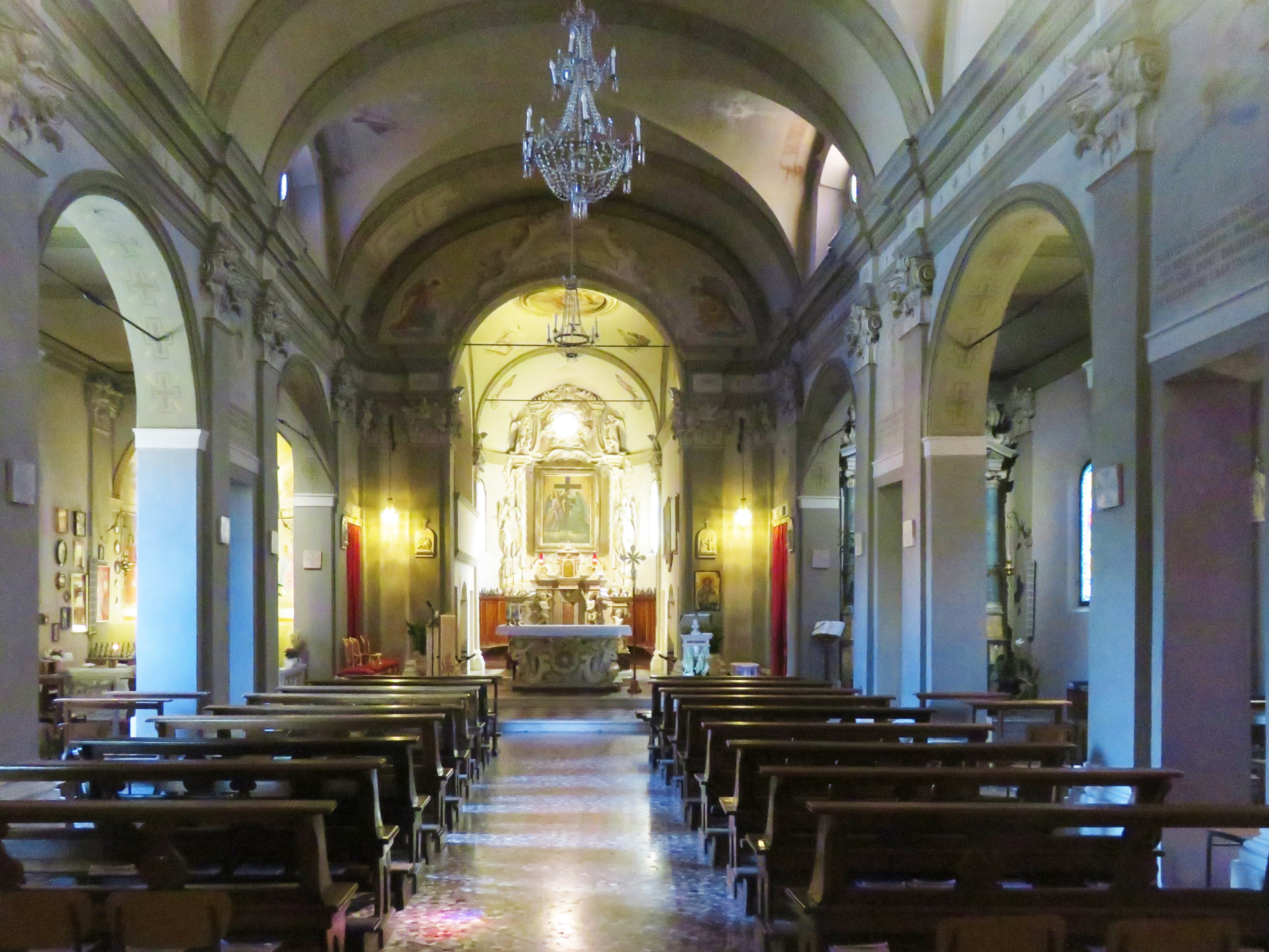 Chiesa dell'Invenzione della Santa Croce Carpi. Navata centrale. Altare maggiore.